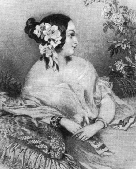 Завадовская Елена Михайловна (1807-1874)